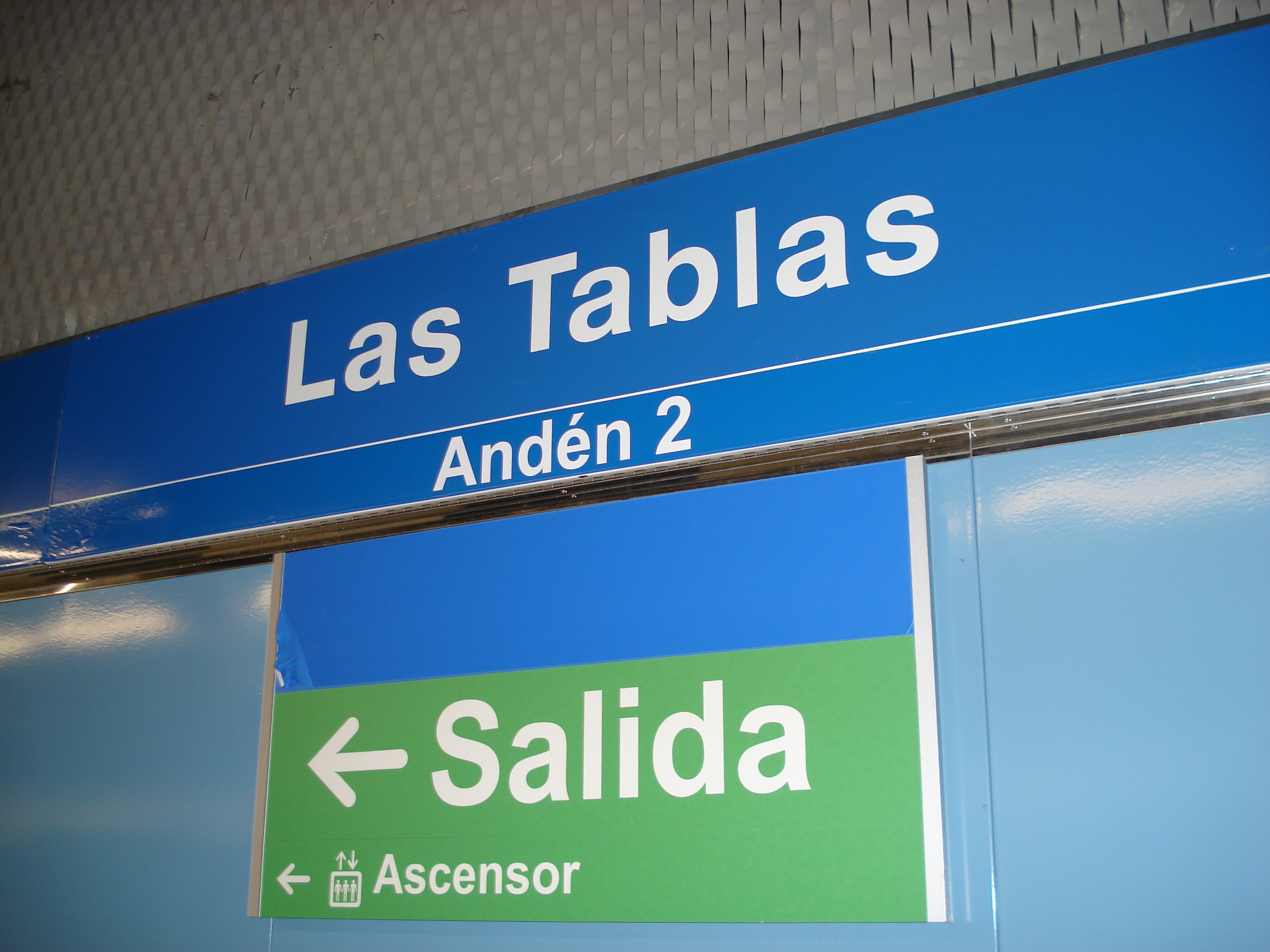 Imagen de la estacion de Las Tablas de Madrid